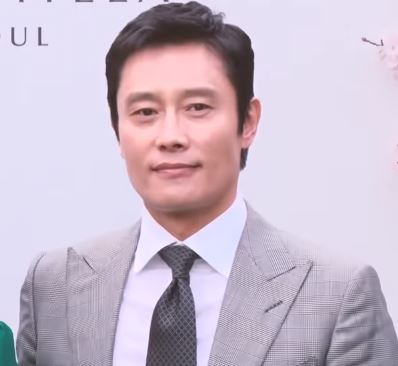 배우 이정현의 결혼기자회견이 7일 오후 서울시 중구 장충동 신라호텔에서 열렸다.